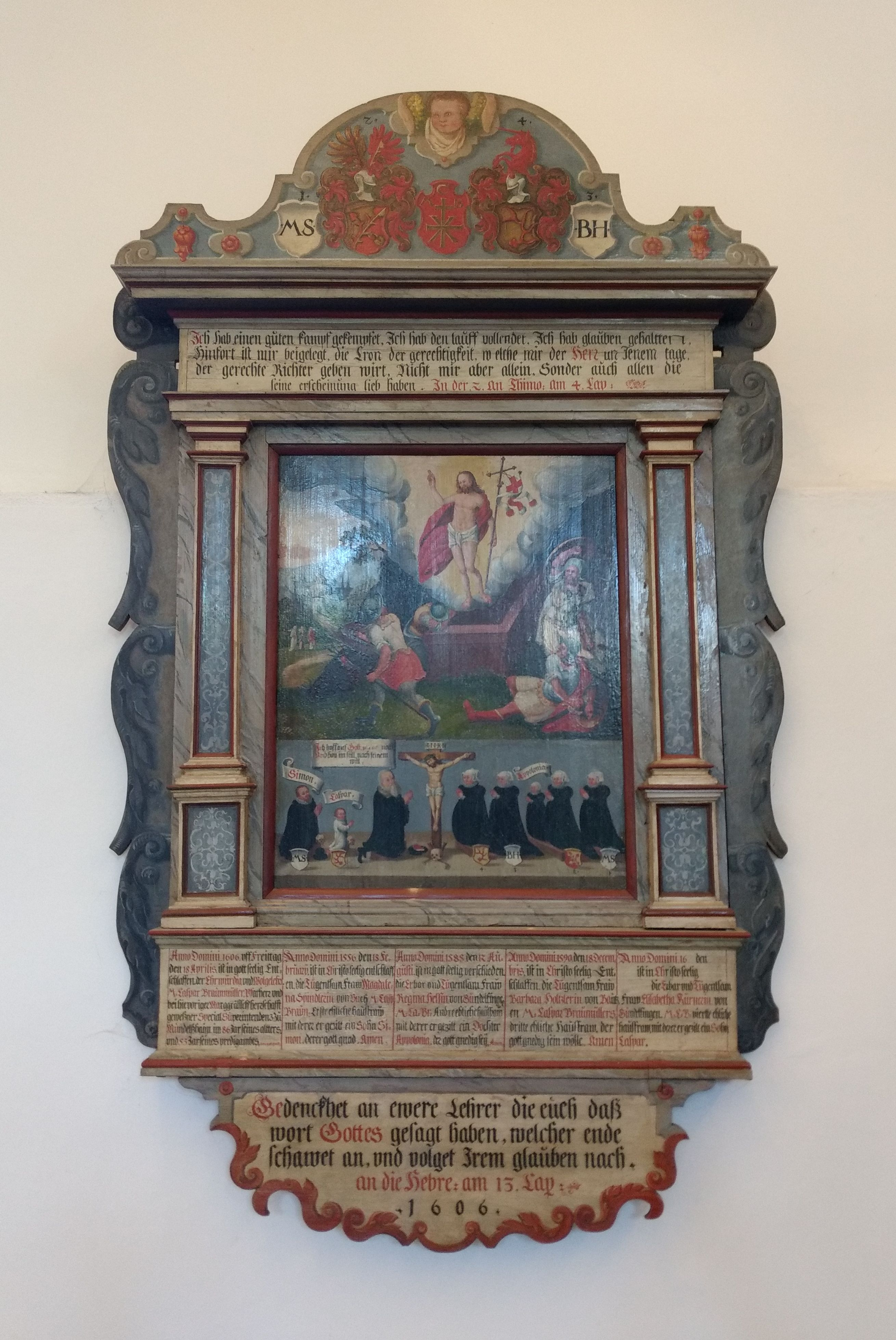 Nikolauskirche Mundelsheim: Epitaph des Superintendenten Caspar Braunmüller (1520-1606)